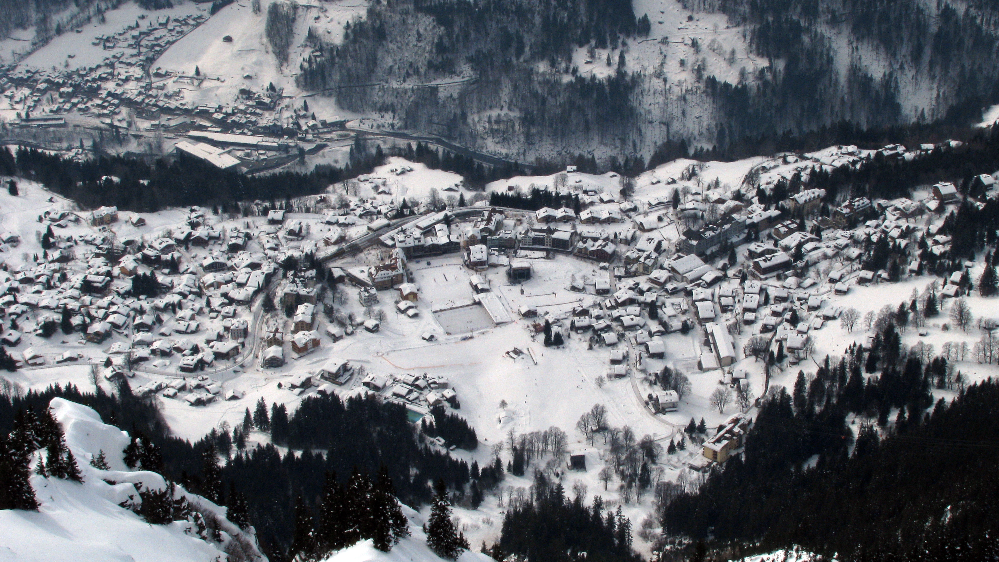 Wengen seen from Männlichen, feb 09